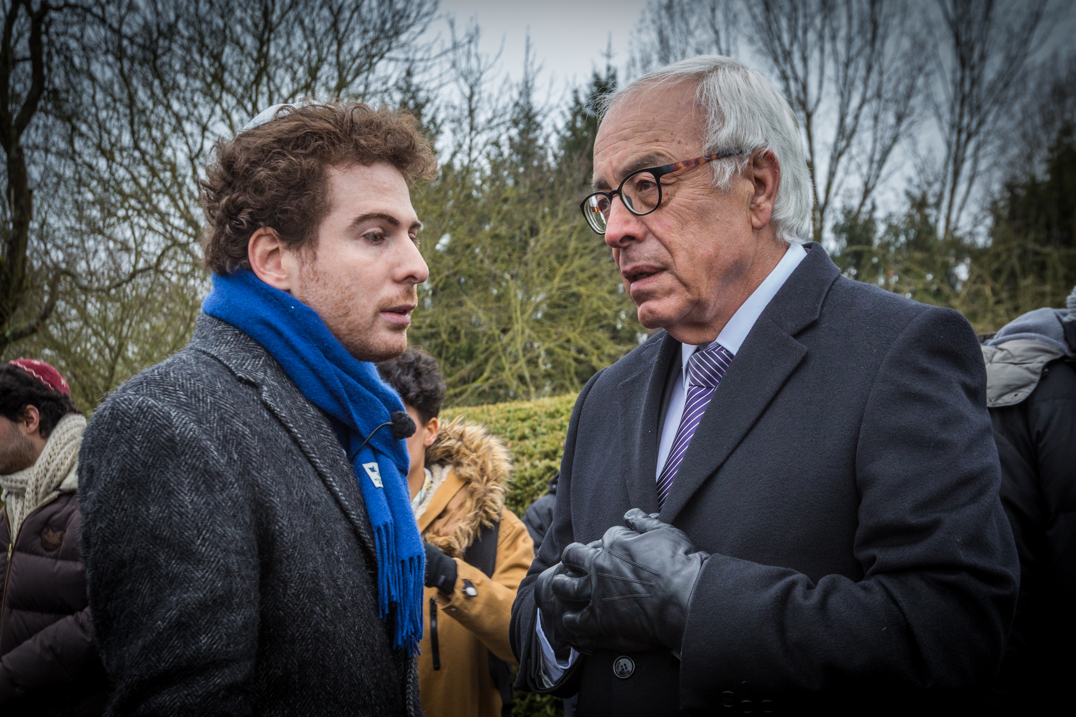 Sacha Reingewirtz, président de l’Union des étudiants Juifs de France (UEJF) en compagnie de Yossi Gal ambassadeur d’Israël en France à Sarre-Union le 17 février 2015